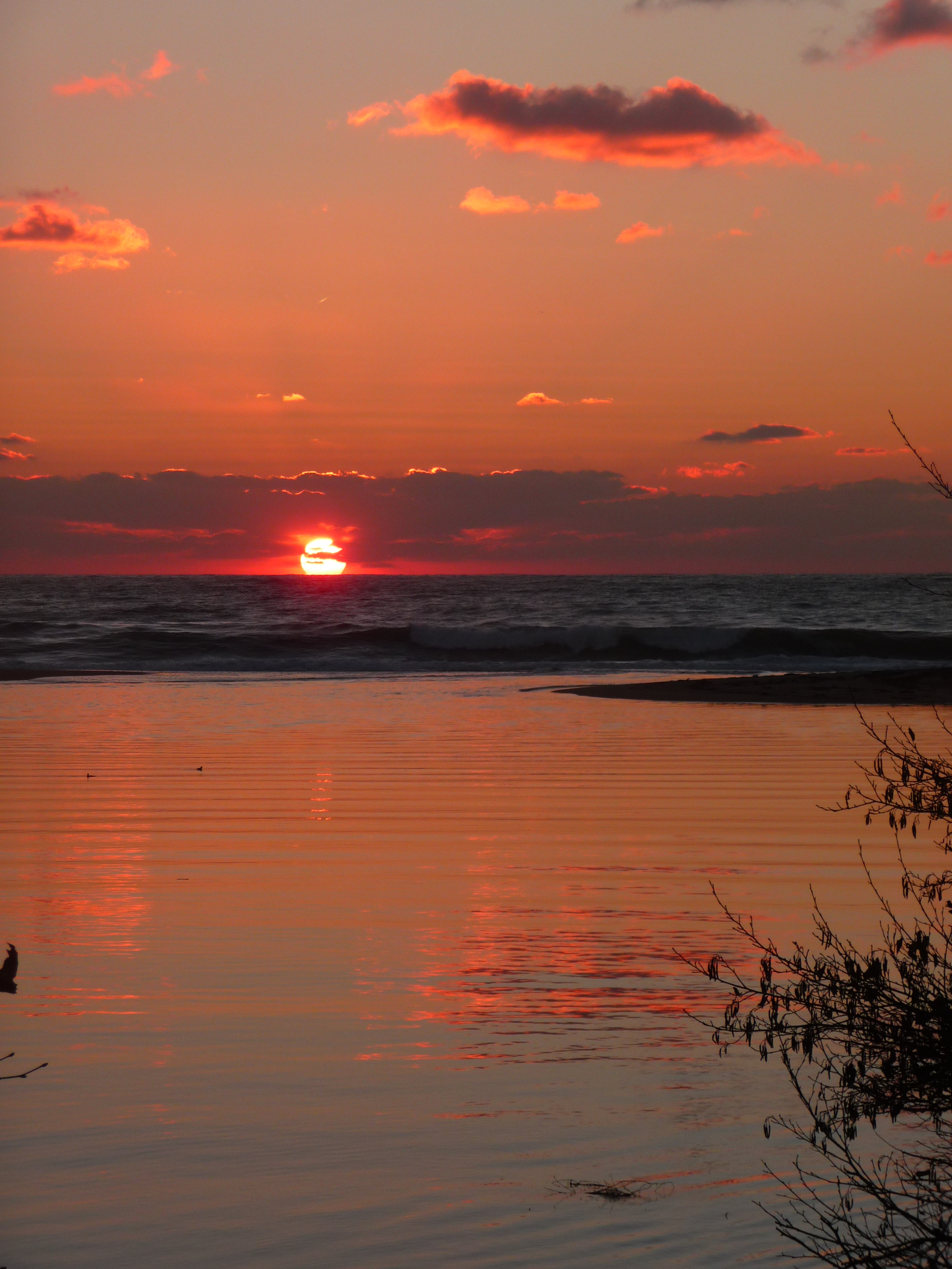 Corsu: U LIAMONE